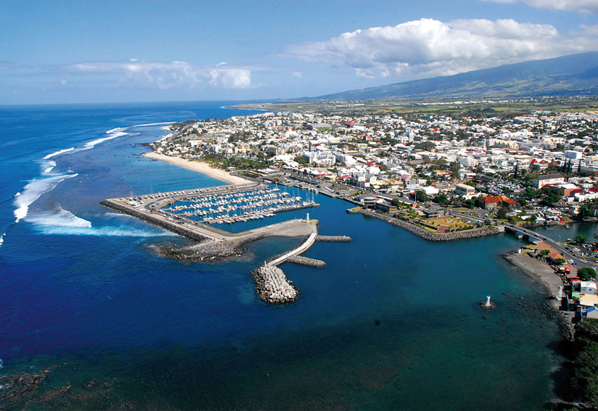 Vue d'une partie de Saint-Pierre et son port depuis un hélicoptère.